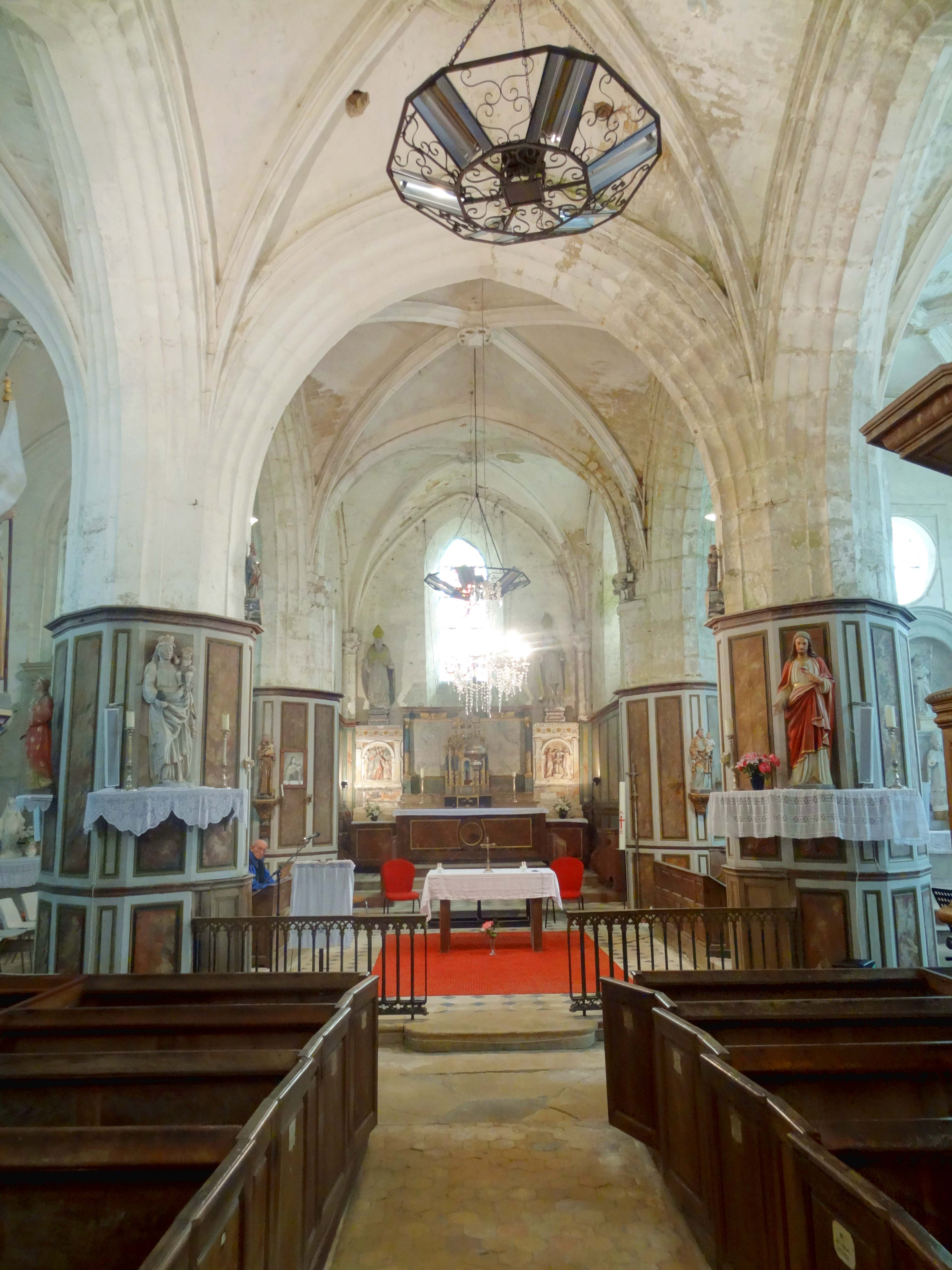 Intérieur de l'église - voir titre.